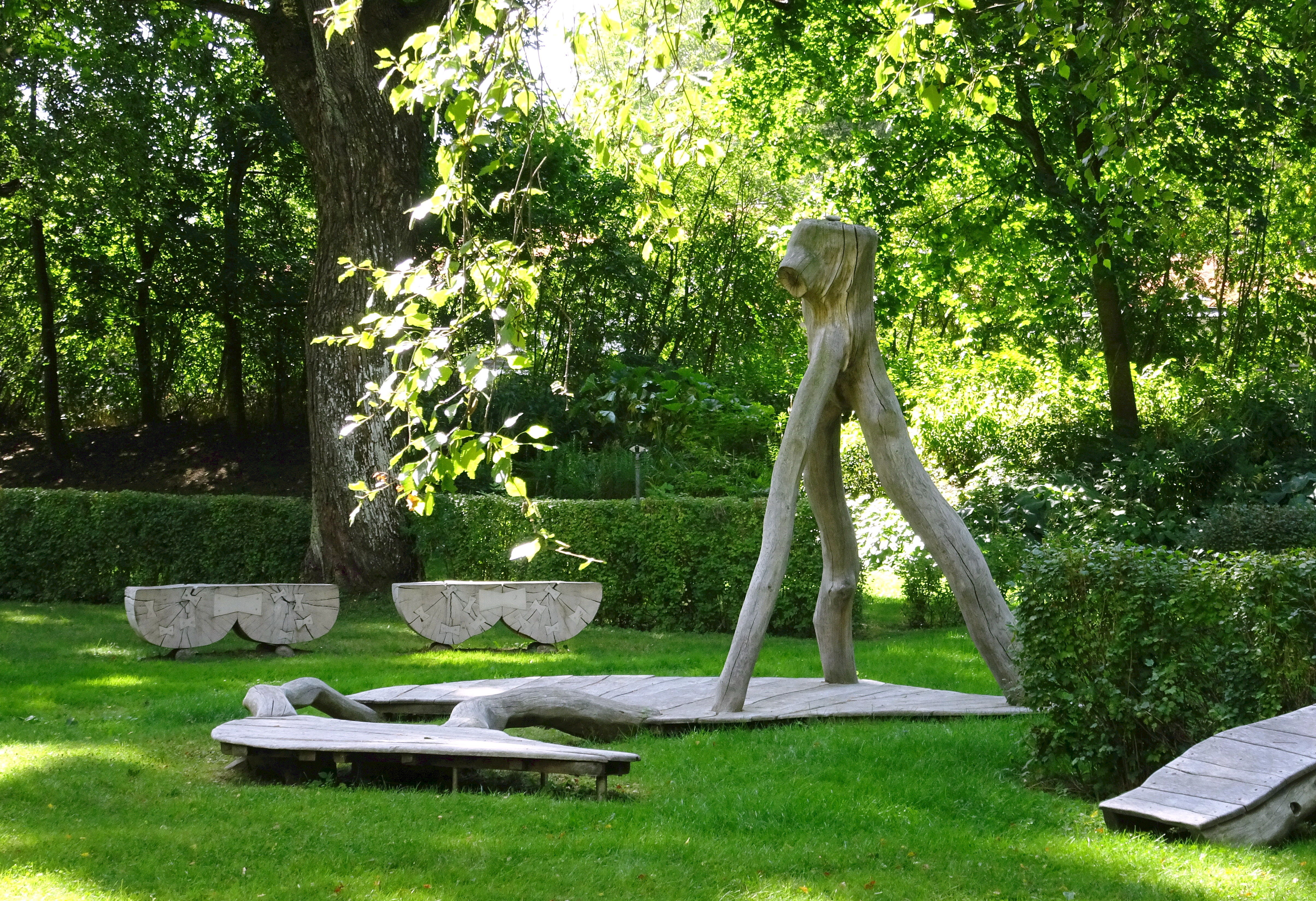 Norra Begravningsplatsen, barnavdelningen